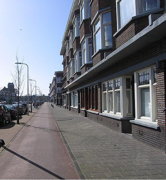 Apeldoornselaan, Rustenburg, Den Haag, Netherlands